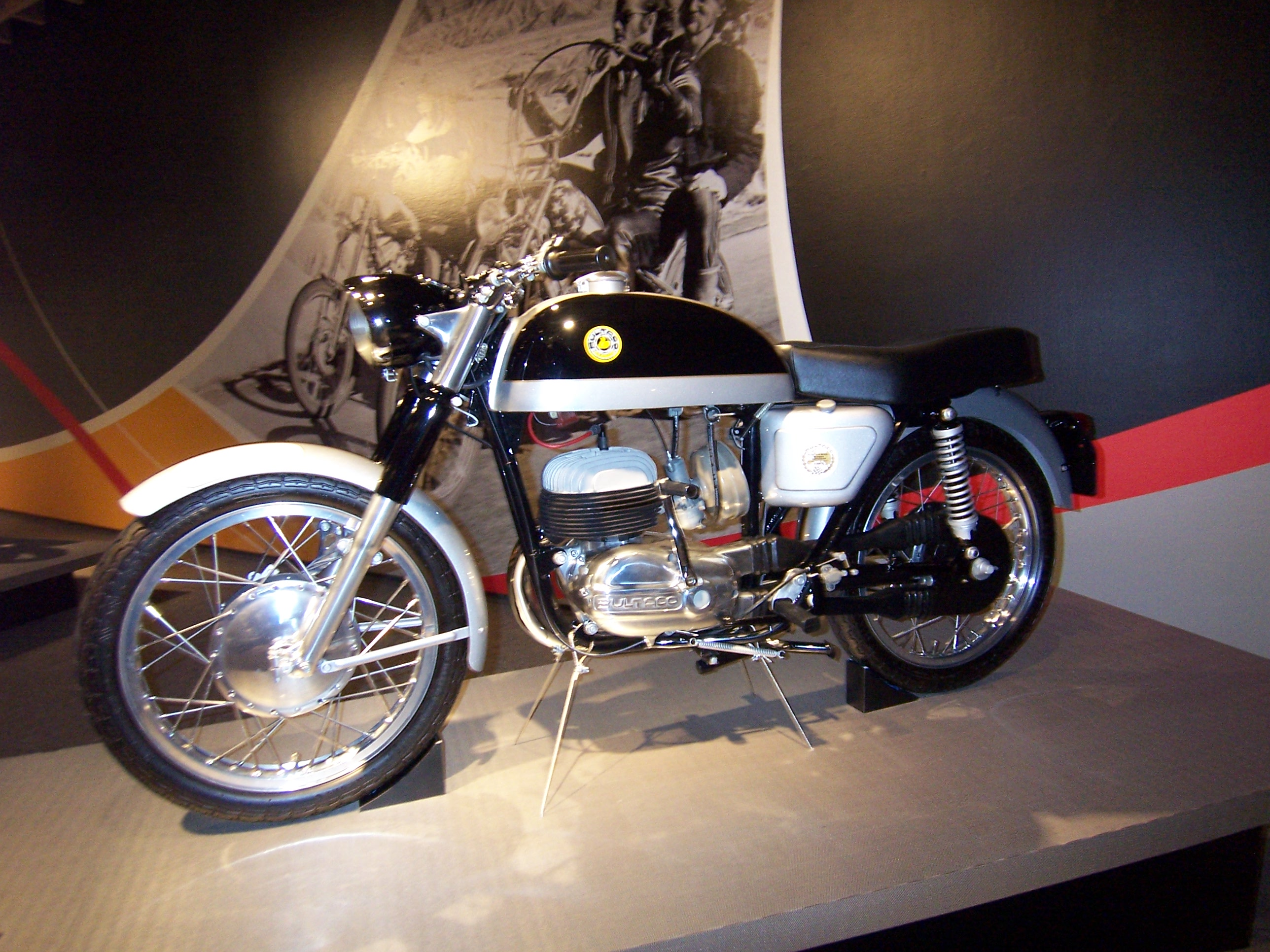 Bultaco Metralla MK2 (1967 - 1974)